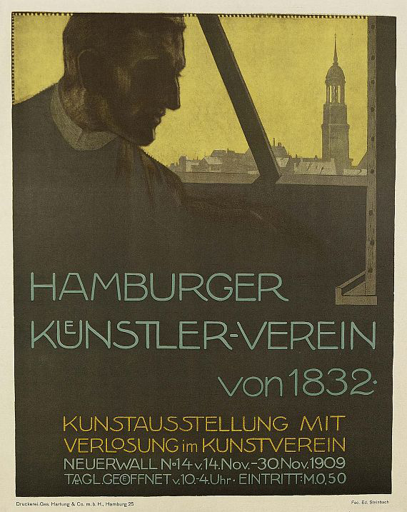 Offsetlithografie von Eduard Steinbach